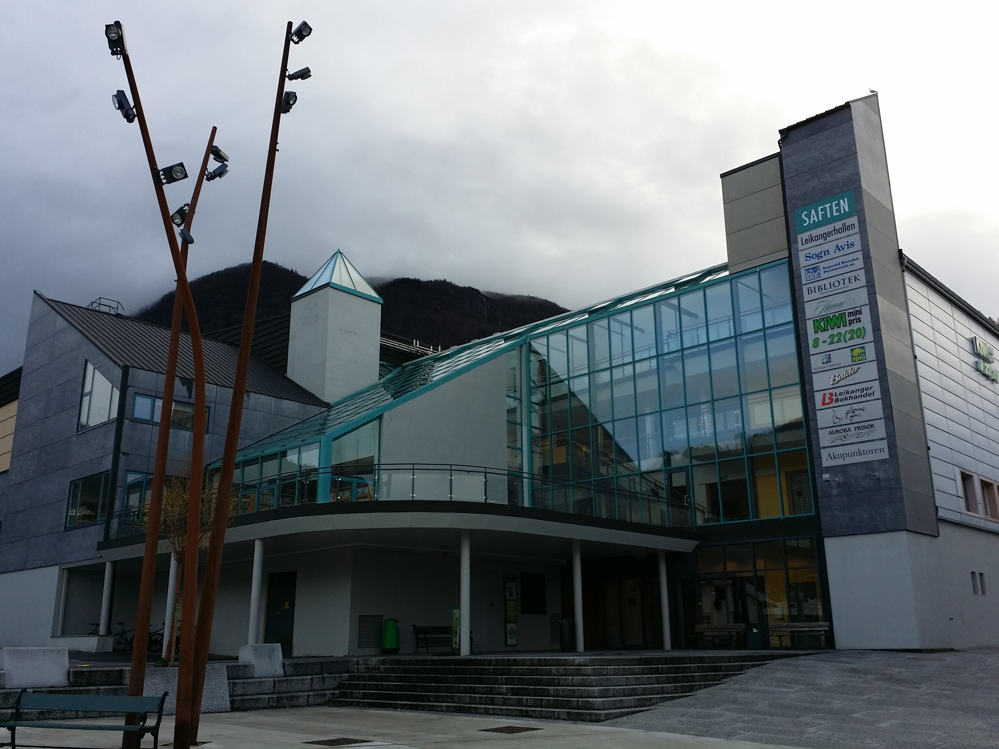 Saften er eit senter i Leikanger kommune som rommar fleire butikkar, bibliotek, idrettssenter og ein idrettshall. Bygget er ein tidlegare konservesfabrikk som har vorte bygd om.